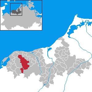 Former Amt Kröpelin in Mecklenburg-Vorpommern - District Bad Doberan